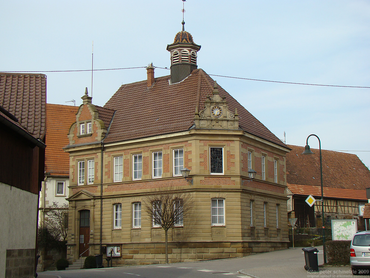 Altes Rathaus in Langenbrettach-Brettach